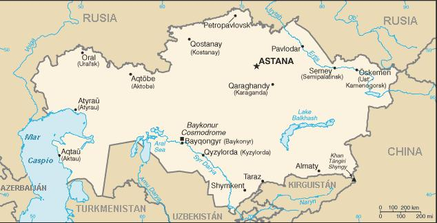 Orientační mapa Kazachstánu